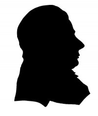 Sivert Aarflot (1759–1817), norsk avismann.